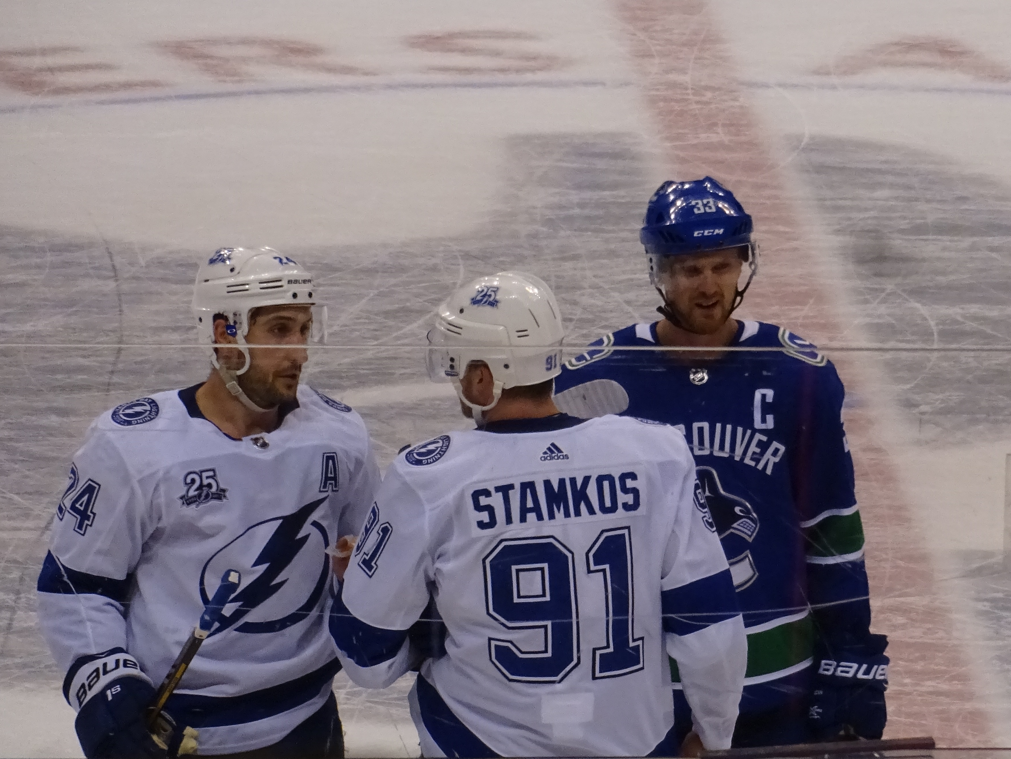 Tam @ Van, 3-Feb-2018